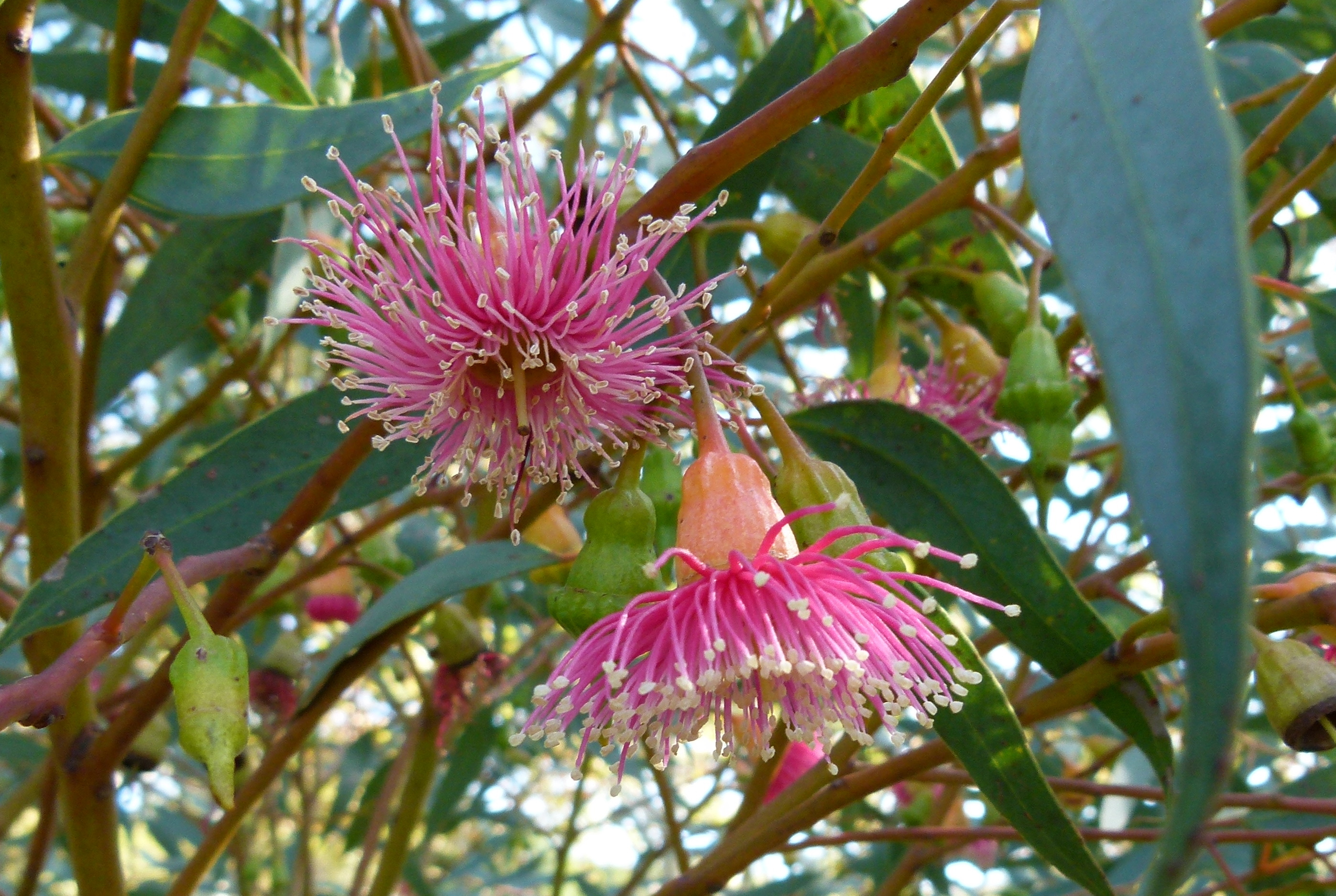 Jardin botanique Barcelone